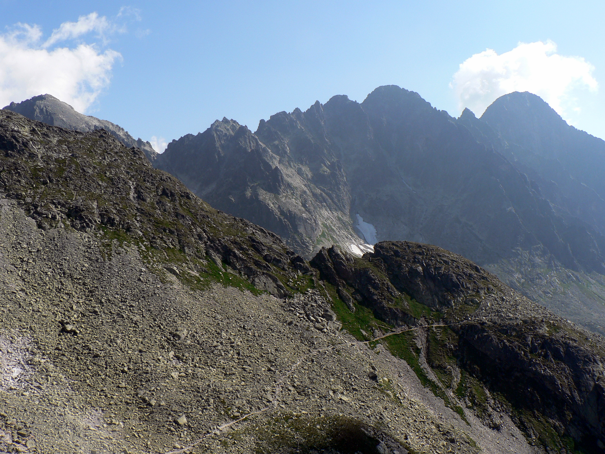 Baranie Rogi, Spiska Grzęda, Mały Durny Szczyt, Durny Szczyt i Łomnica, poniżej Pięciostawiańska Kopa